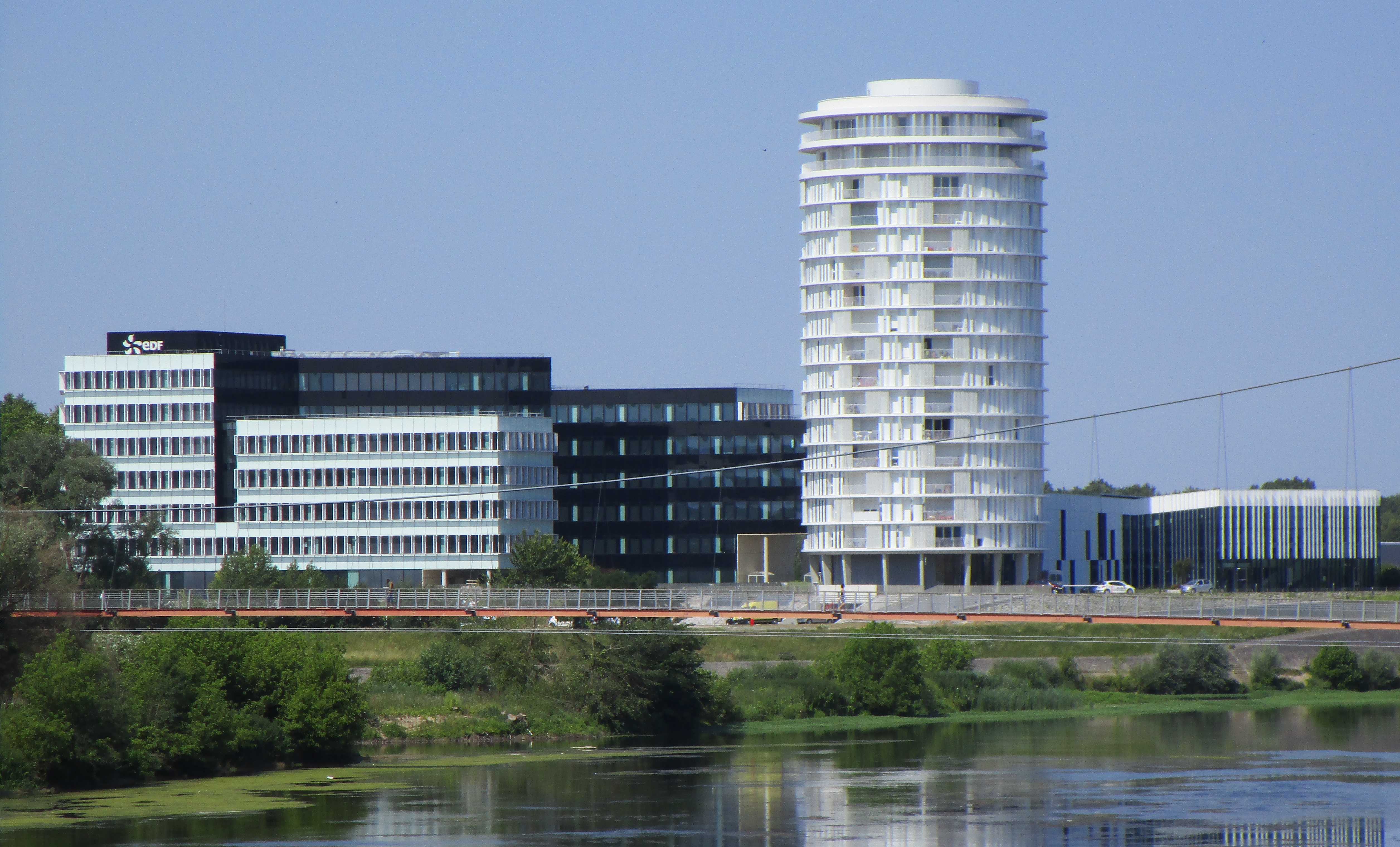 Vue de la Tour lumière à droite et des bâtiments administratif d'EDF à gauche, depuis le pont de la Vendée. Quartier des Deux-Lions à Tours.